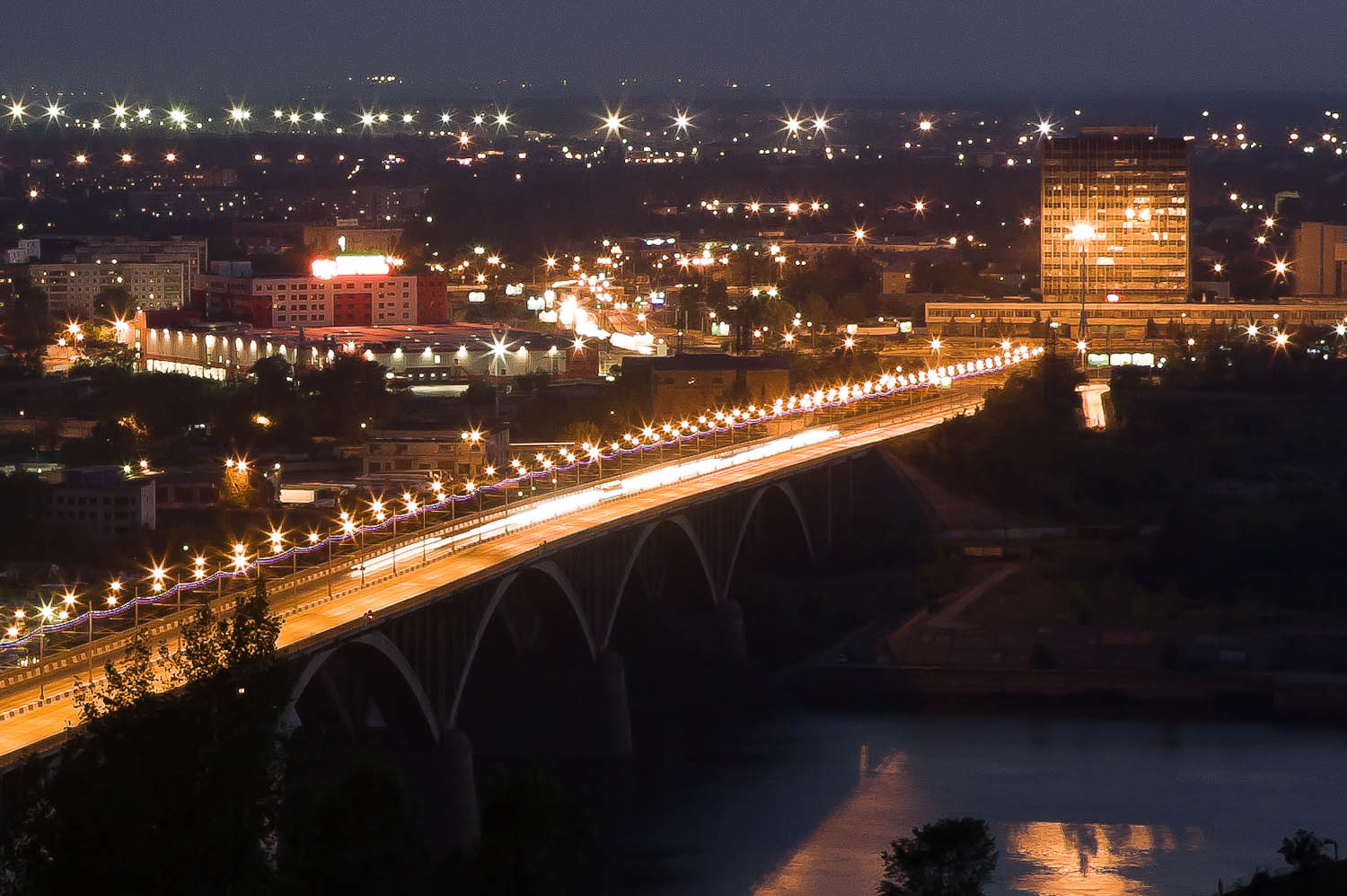 Нижний Новгород. Ночной вид на Молитовский мост